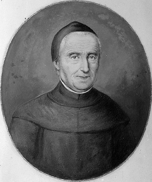 Pater Marianus Herzog (1758–1828), Anführer der Einsiedler am Etzel, 1./2. Mai 1798. Klosterarchiv Einsiedeln, Professbuch B, Nr. 462.